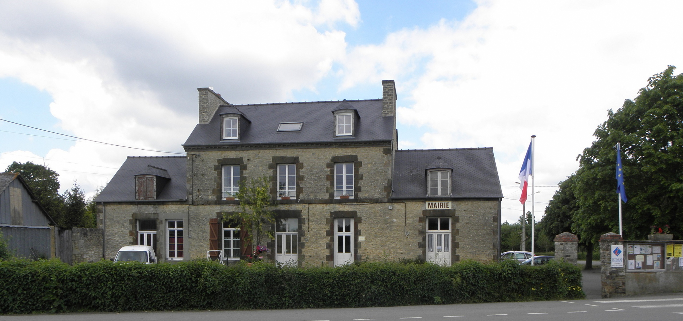 Mairie de Saint-André-des-Eaux (22).